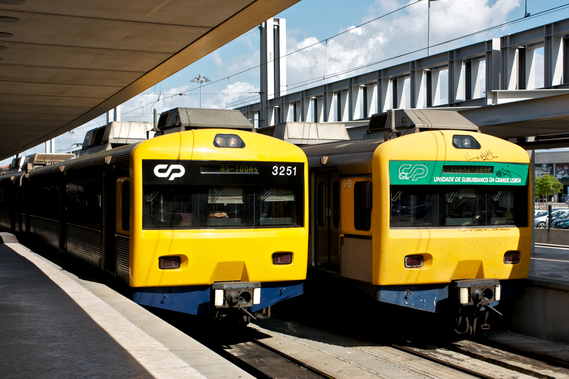 Local: Estação do Cais do Sodré [Linha de Cascais, PK 0,0] Data e hora: 19 de Maio de 2011 [16h48] Material: Automotora 3251 [Unidade Quádrupla Eléctrica – Sorefame]